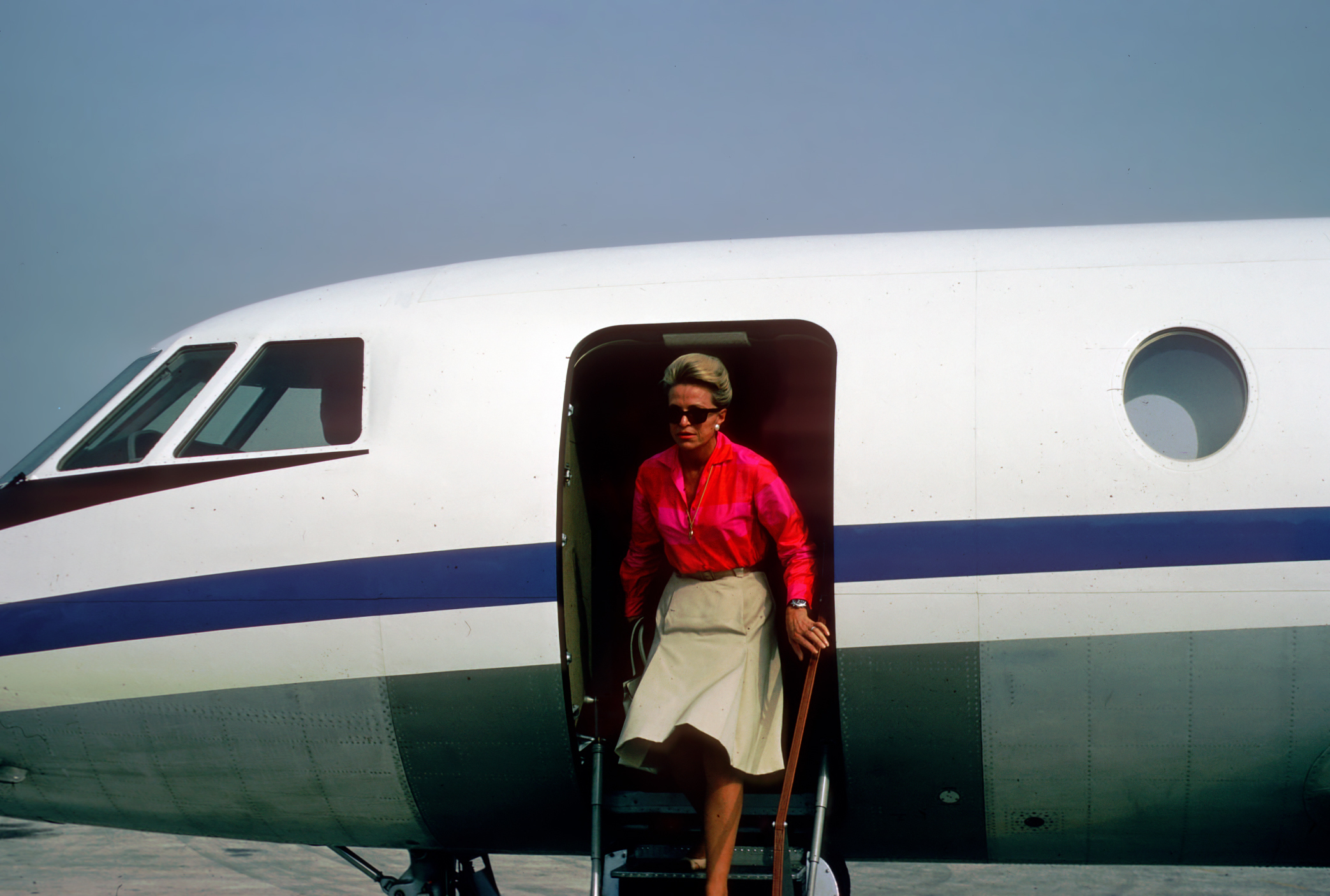 Descente de son avion, Jacqueline va être reçue par le président Houfouet-Boigny